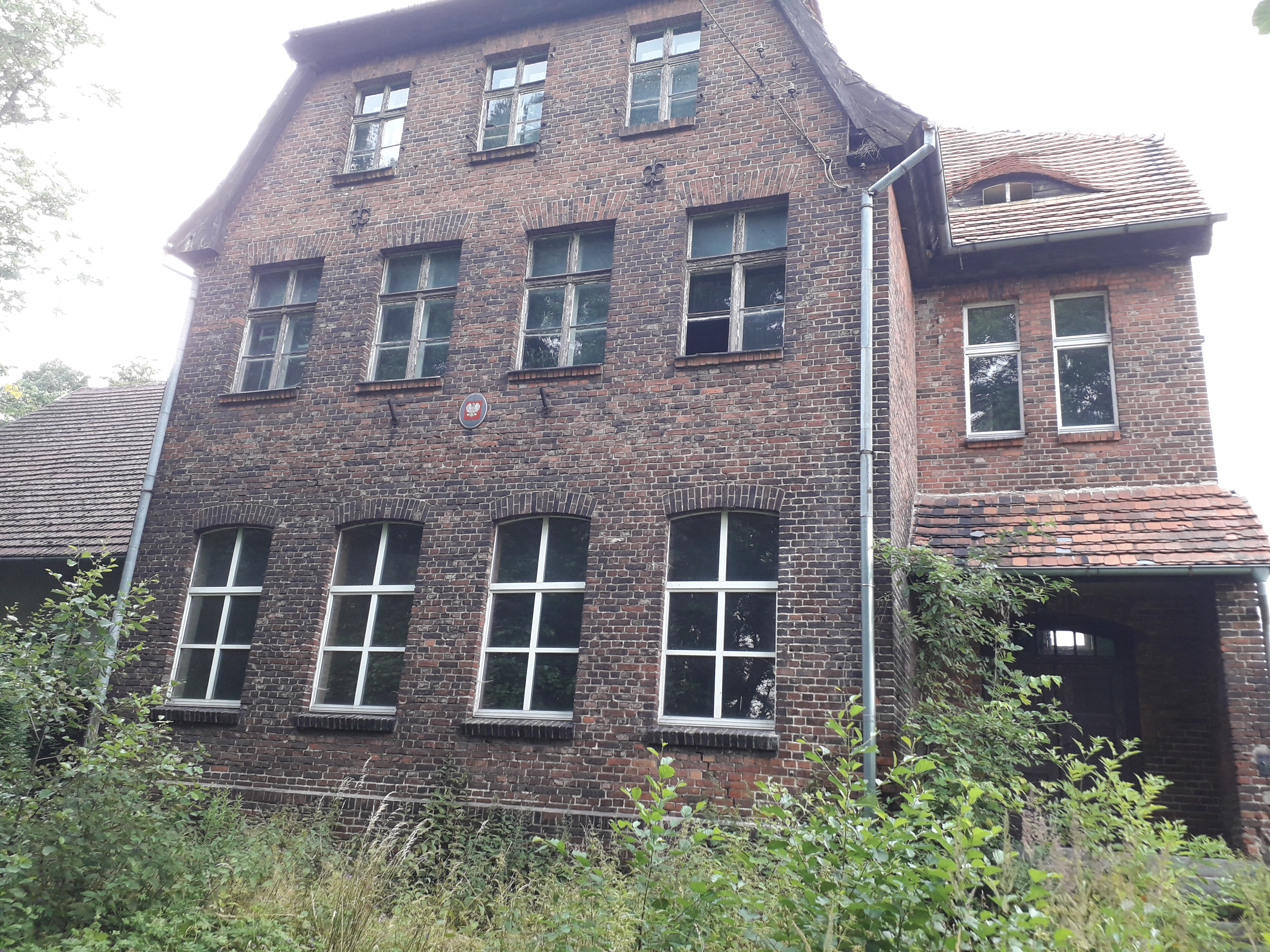 Budynek szkoły